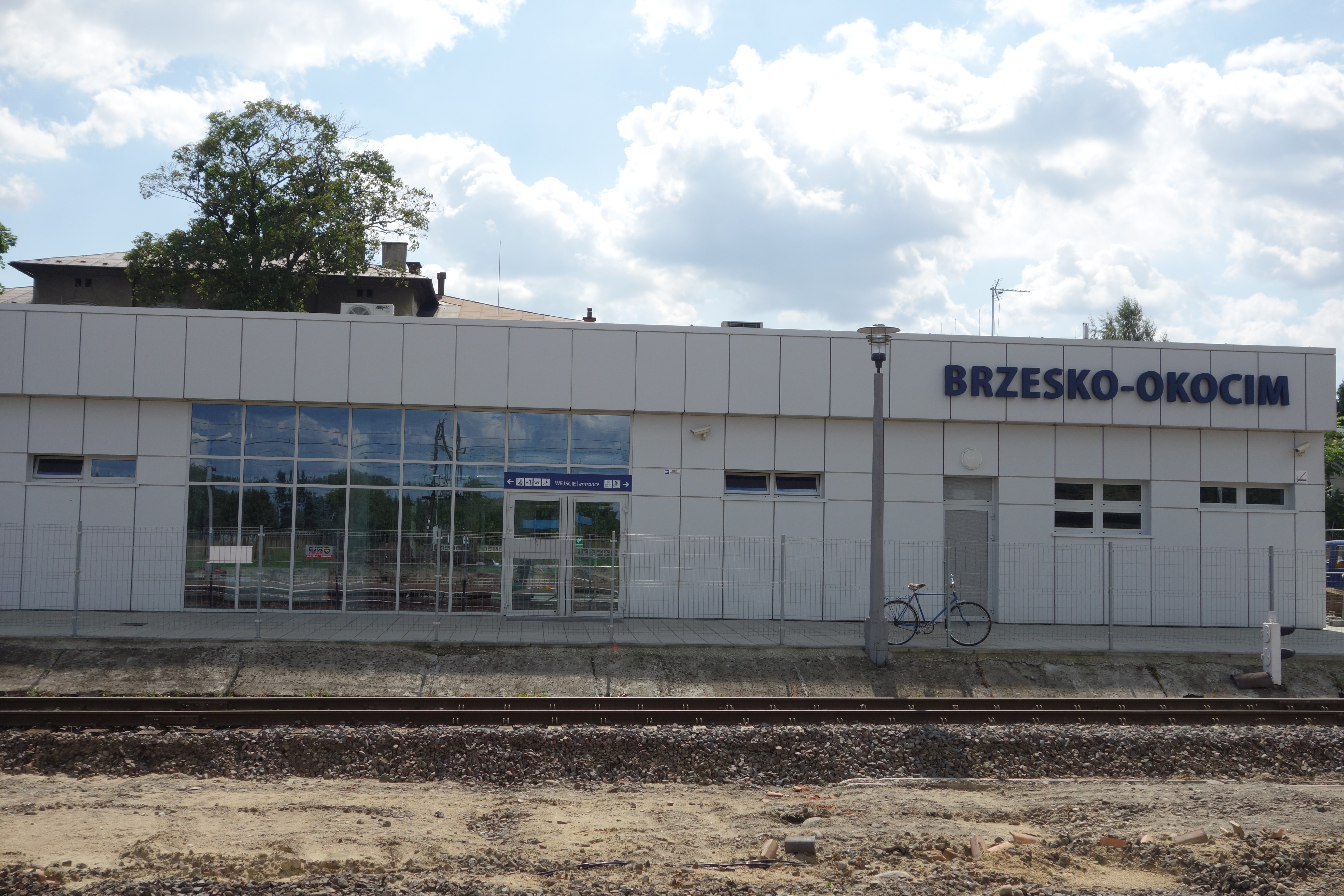 Brzesko-Okocim - dworzec kolejowy This photo was taken during Railway Wikiexpedition 2014 set up by Wikimedia Polska Association in cooperation with Fundacja Grupy PKP. You can see all photographs in category Wikiekspedycja kolejowa 2014. English | Polski | +/−